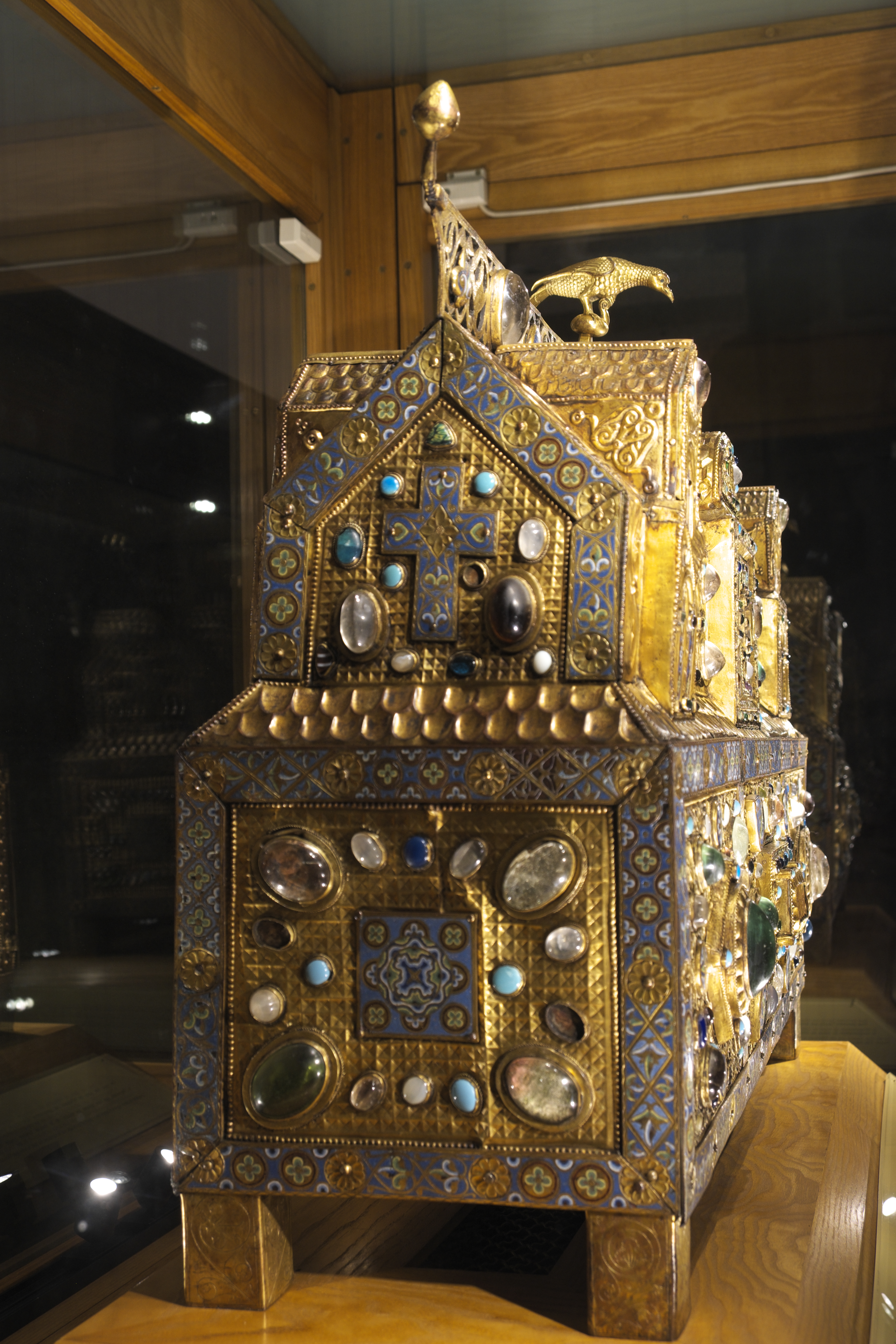 Katholische Pfarrkirche Saint-Antoine in Ambazac im Département Haute-Vienne (Nouvelle-Aquitaine/Frankreich), Reliquienschrein von Ambazac, zwischen 1180 und 1200, Seitenansicht